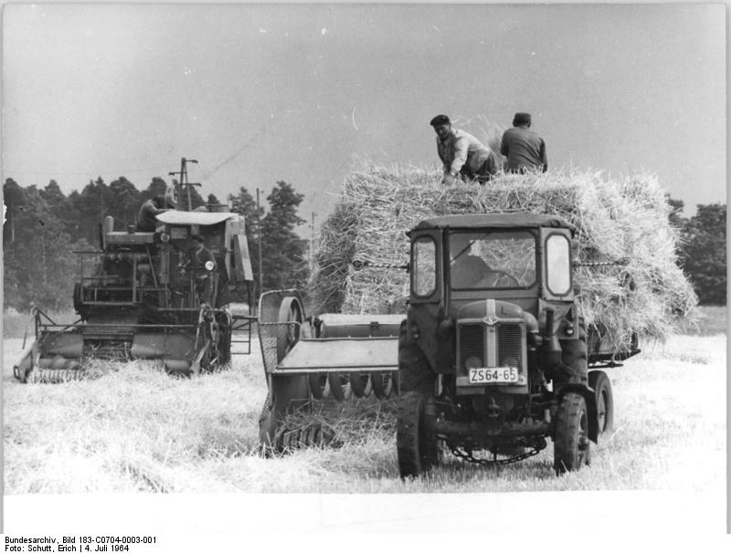 LPG Laubedorf, Gerstenernte Zentralbild Schutt 4.7.1964 Bezirk Cottbus: LPG Laubedorf begann mit der Ernte der Wintergerste. Die LPG "Neues Leben" (Typ III) in Laubsdorf, Kreis Cottbus-Land, hielt in diesen Tagen Generalprobe zur diesjährigen Getreideernte ab. Von einem 5-Hektar-Schlag wurde im Schwaddrusch Wintergerste eingebracht. Auf unserem Foto folgt dem Mähdrescher die Räum- und Sammelpresse. Um Tempo und Qualität geht es den Genossenschaftsbauern von Laubdorf. Überwiegend wird der Schwaddrusch bei der Getreideernte angewandt und somit Zeit gewonnen. Das Stroh wird sofort vom Feld geräumt, nachts wird geschält und die ersten Zwischenfrüchte kommen in den nächsten Tagen in den Boden.